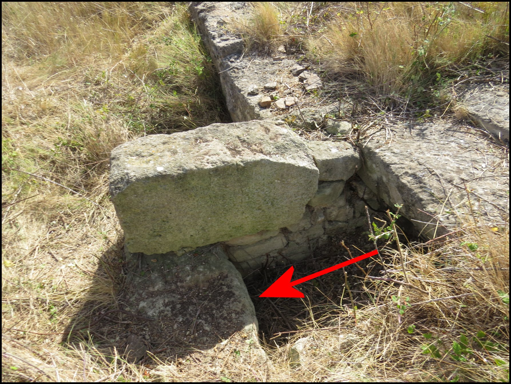 "Regard" dégagé de ses ronces (A.Lopez) sur la terminaison du collecteur oriental avec ses grandes dalles de couverture, un bloc en surplomb et un mur perpendiculaire. Flèche : sens de l'écoulement des eaux.